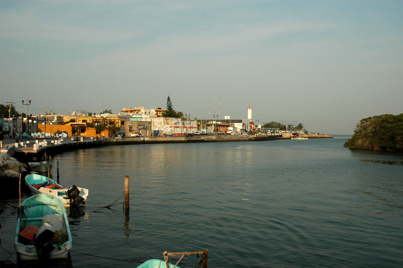 Campeche, Champotón